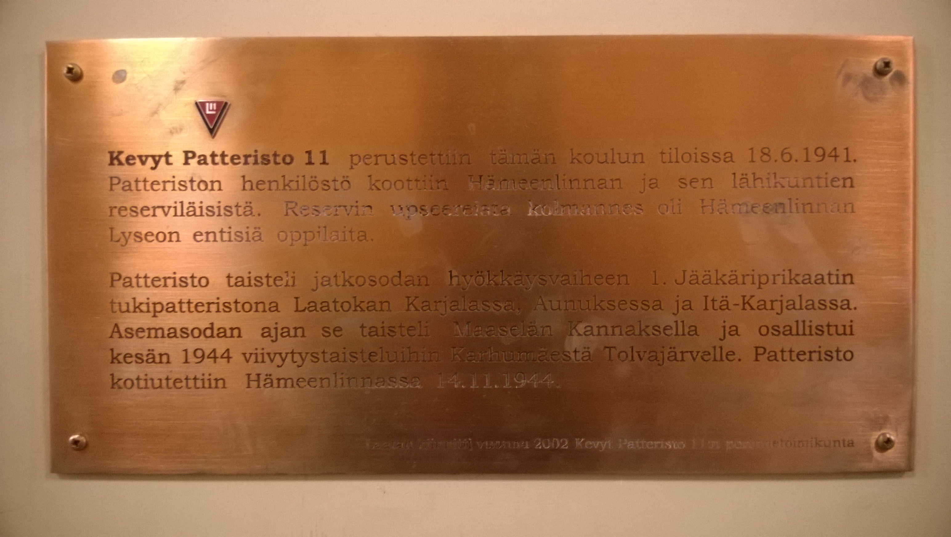 Kevyt Patteristo 11:n joukko-osastotunnus L11 tarkoittaa Osasto Lagukseen kuulumista ja V-muoto viittaa patteriston komentajaan majuri U. Vesenterään. Sodan aikana patteriston tunnuksena käytettiin punamustan kauluslaatan kärjestä leikattua kolmion muotoista hihamerkkiä. (Kuva mehelin, tunnus Kevyt Patteristo 11 perustamisen muistolaatasta Hämeenlinnan lyseon juhlasaliin johtavan aulan seinällä.)